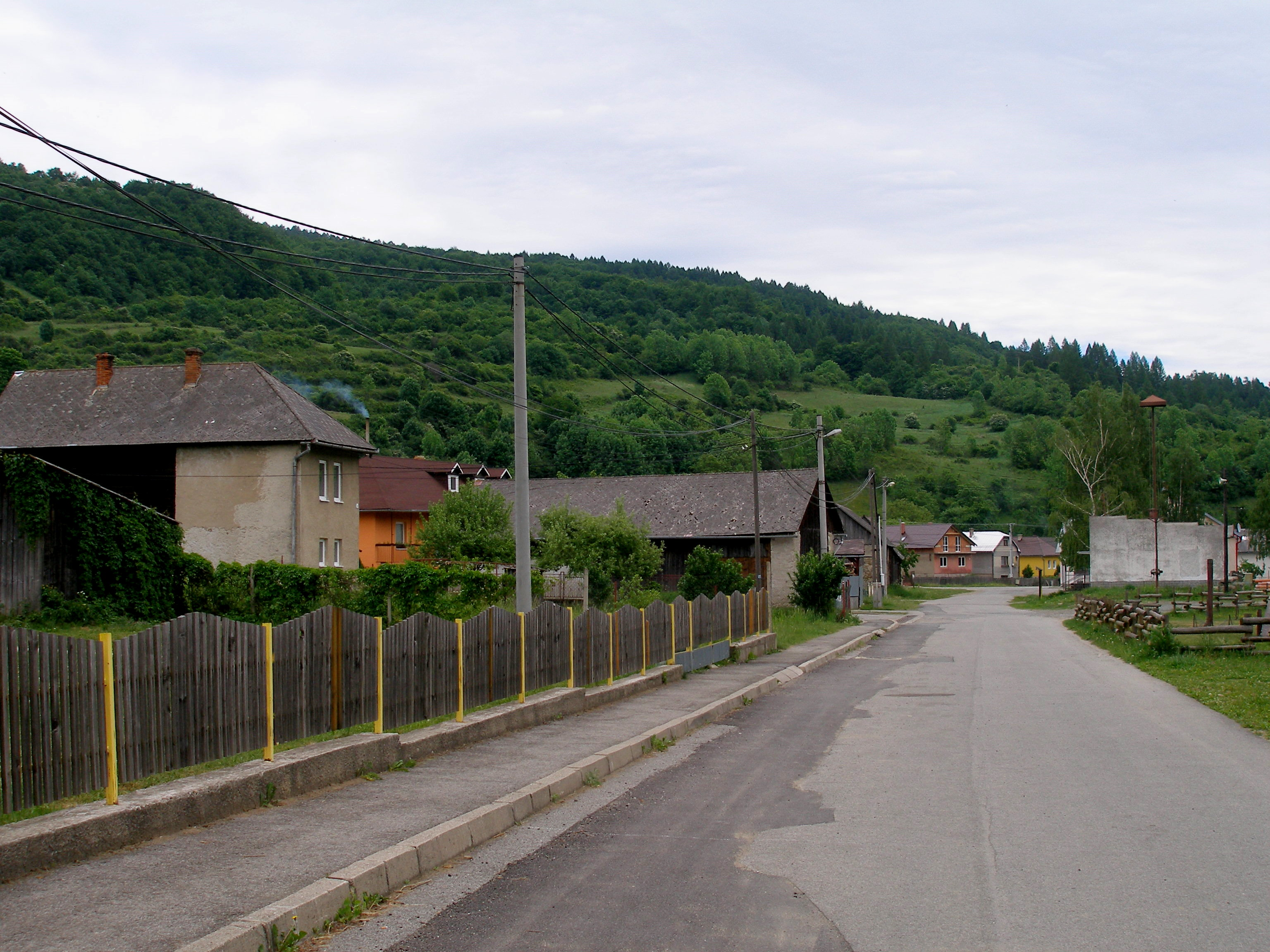 Obec Tichý Potok okres Sabinov.